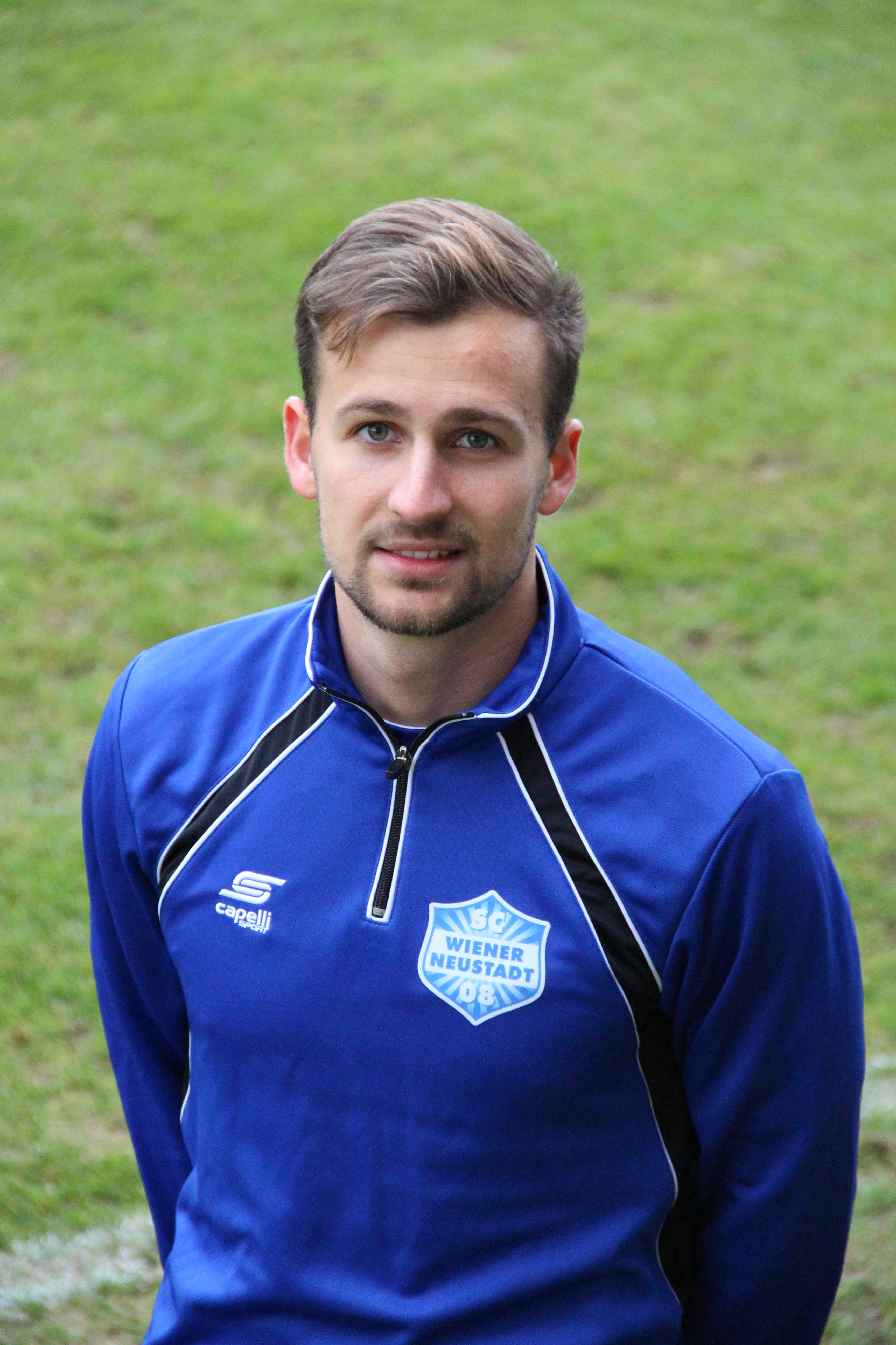 Nico Gorzel (SCWN)